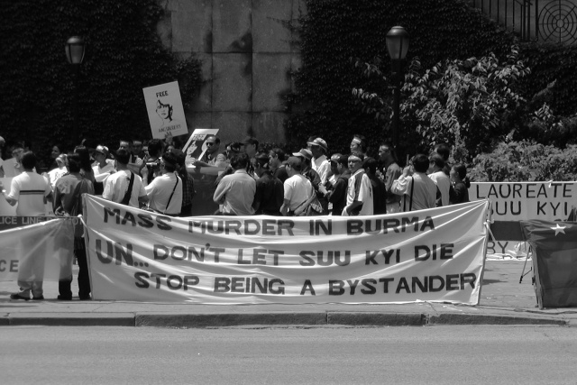 Manifestion pour la libération de Aung San Suu Kyi au siège de l'ONU à New York